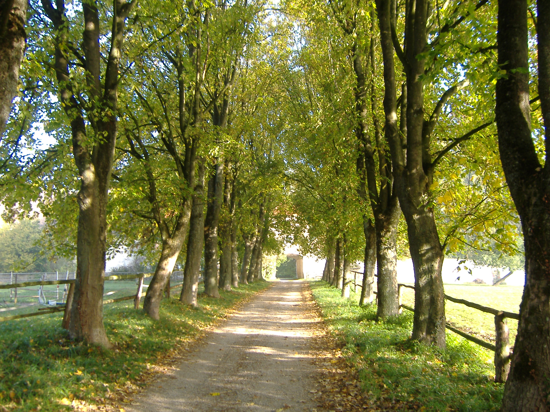 Hammel